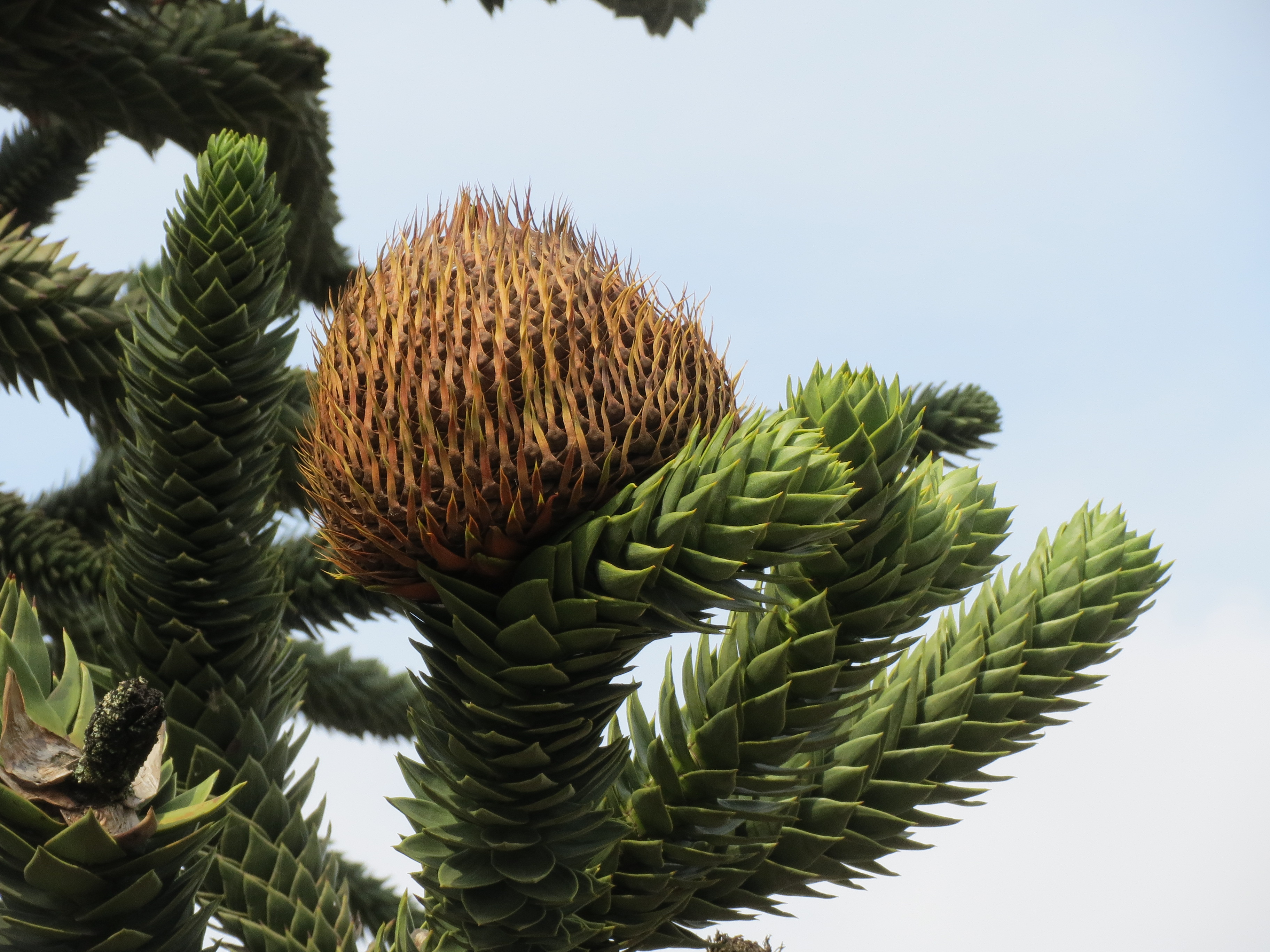 Andentanne (Araucaria araucana) in Hockenheim